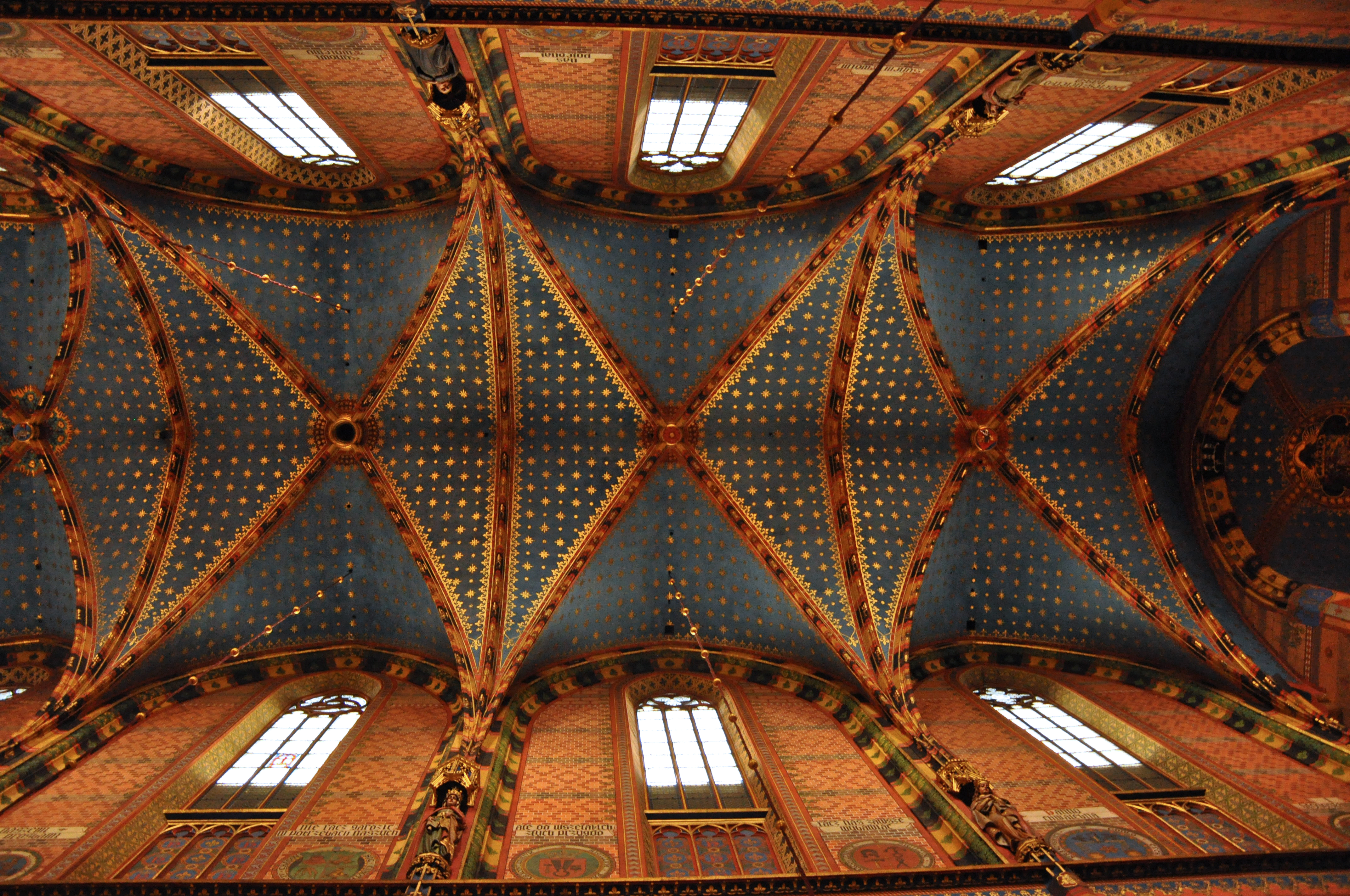 Kościół Mariacki w Krakowie